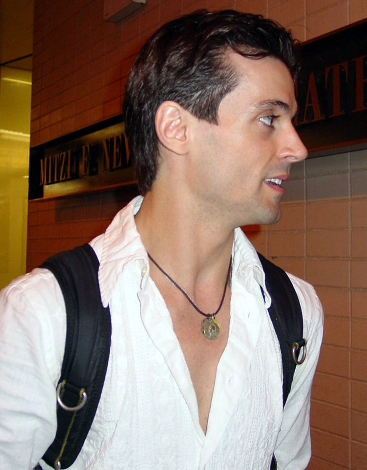 danseur Angel Corella backstage at the Met